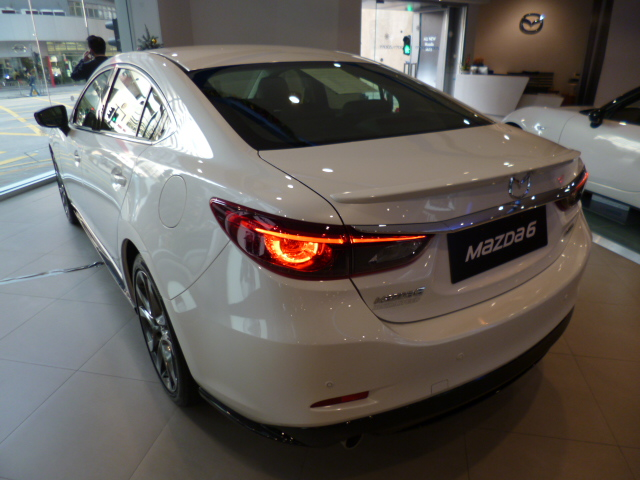 マツダ・GJ